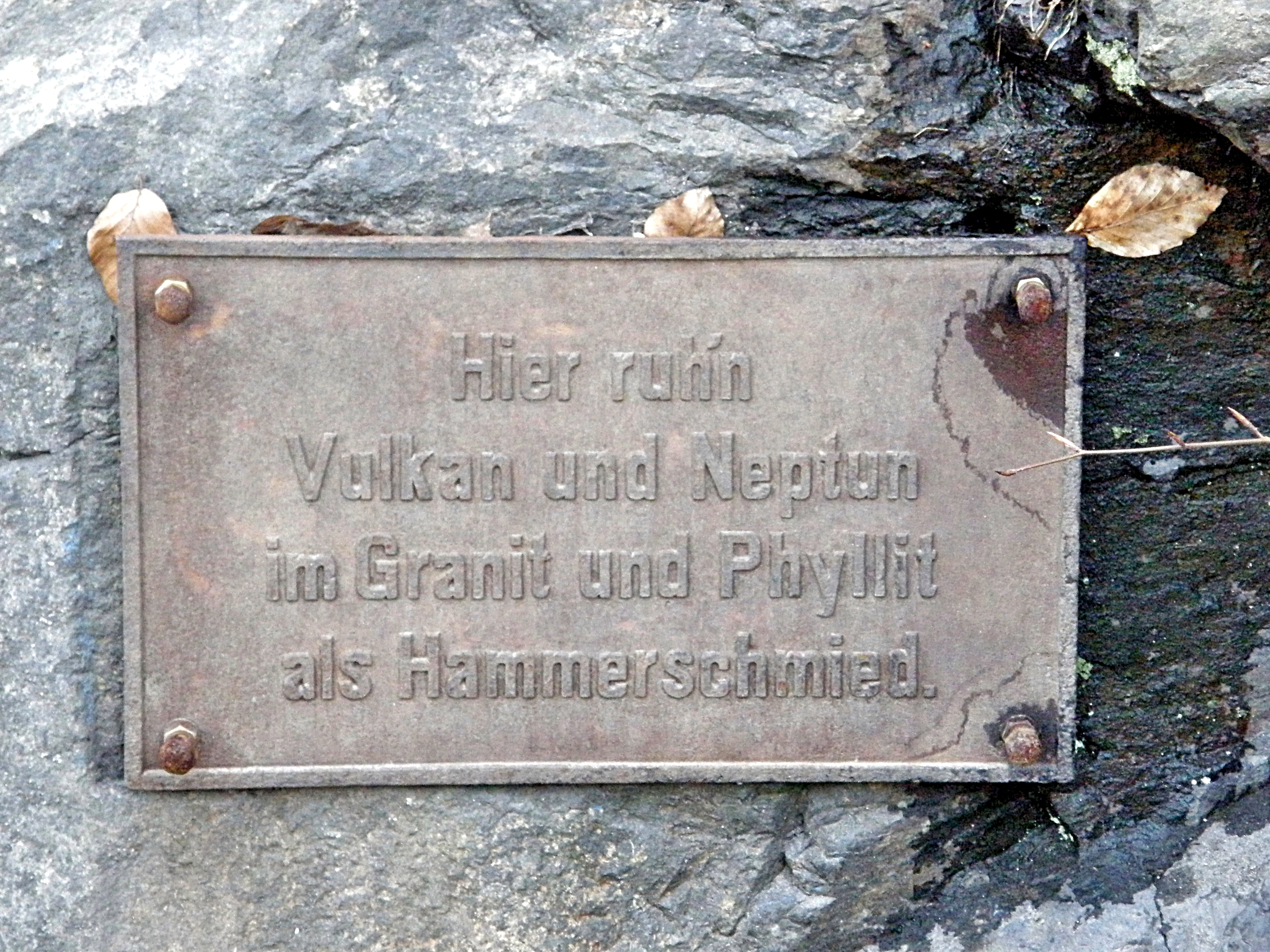 Aue, „Der Hammerschmied“